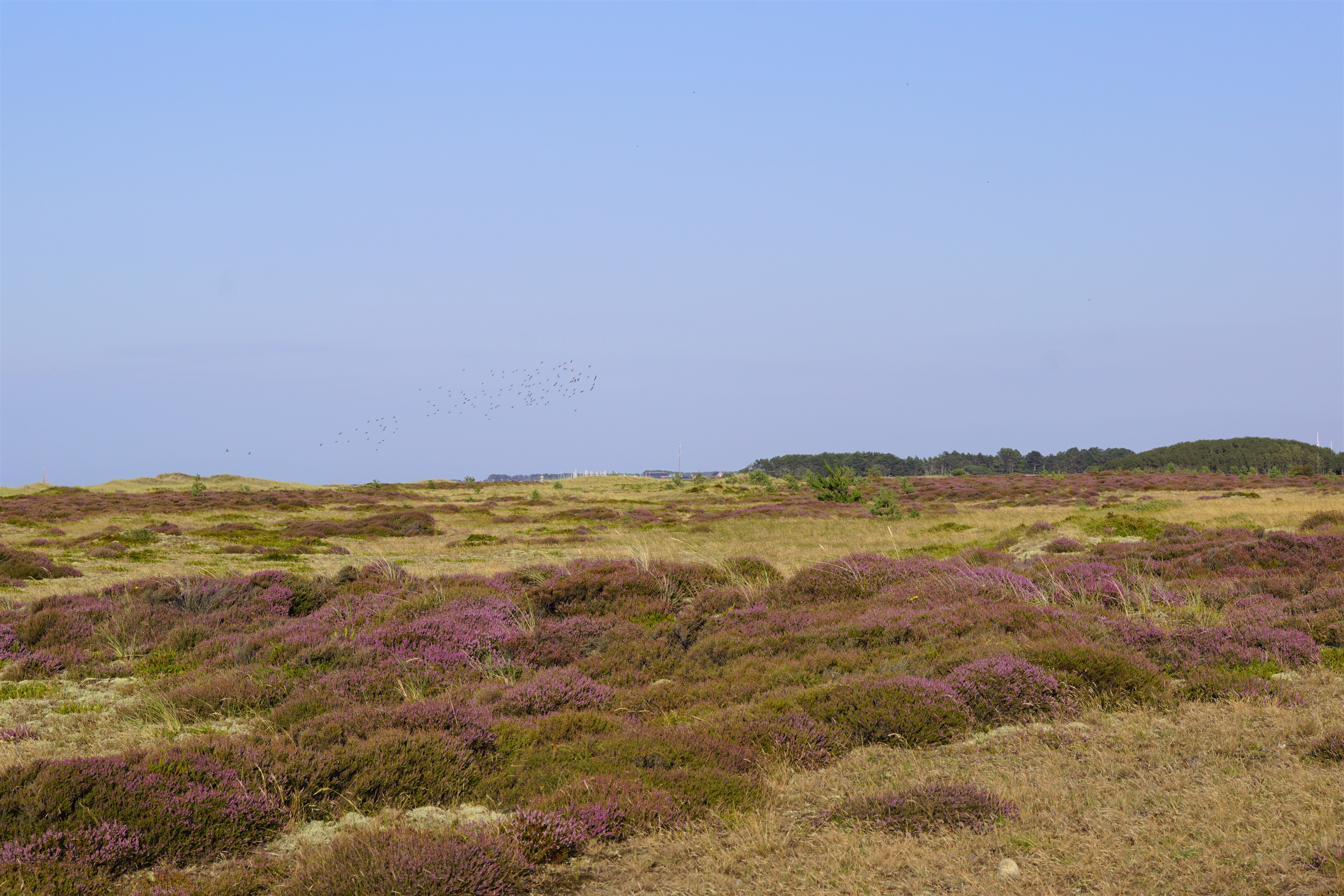 Nordmarken baglandet set mod øst